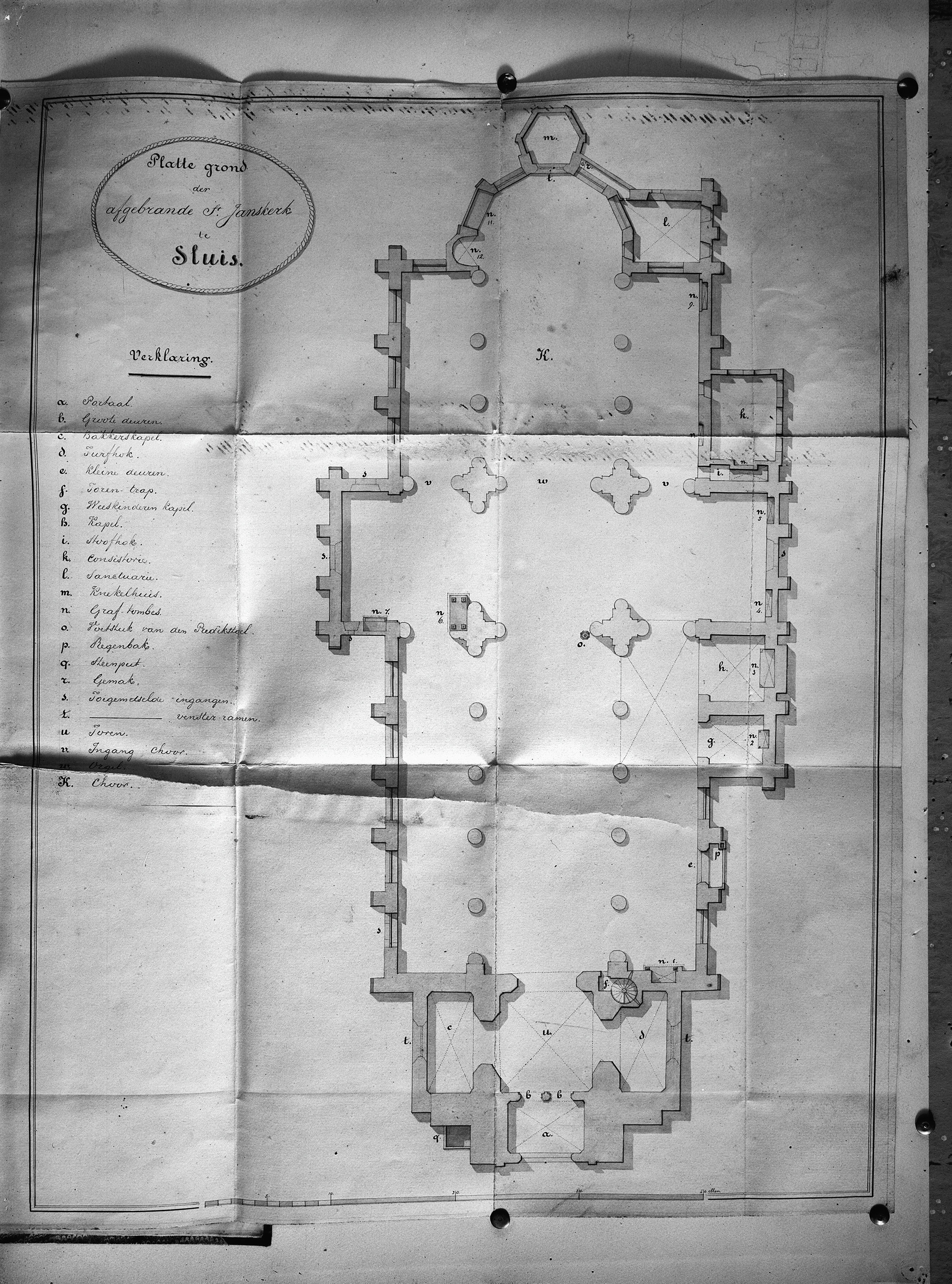 Voormalige Sint Janskerk: Plattegrond van de St. Janskerk te Sluis, afgebrand 1811, naar tekening in een hs. in de Oudh.kamer te Sluis, (nr.570) 1920 (opmerking: Fotonummer 9056)